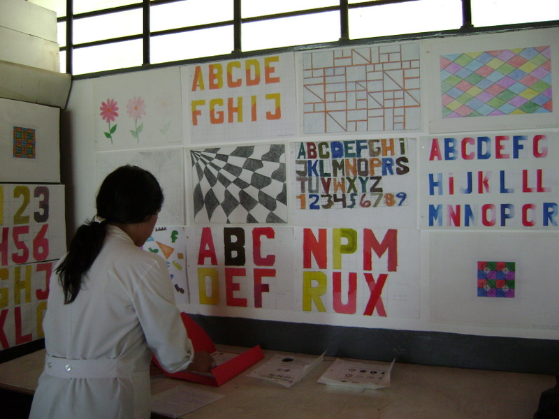 Muestra Anual de Arte